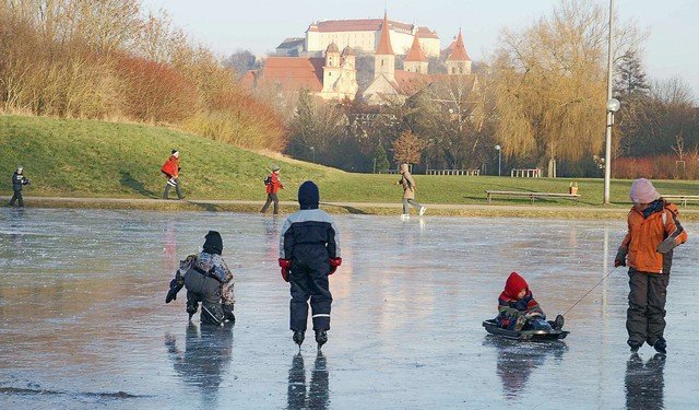 Eislaufen in Ellwangen